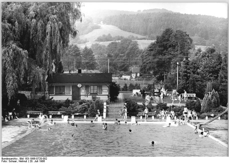 Dermbach, Blick auf das Freibad ADN-ZB Schaar 20.7.86-GE.-Bez.. Suhl: 800 Jahre Dermbach-Das Freibad ist ein beleibter Freizeittreffpunkt der 3600 Einwohner zählenden Rhöngemeinde, die vom 19.-27.7.86 mit einer Festwoche ihr 800jähriges Ortsjubiläum feiert. In den letzten 5 Jahren wurden bei der Gastaltung und Verschönerung der Gemeinde sowie zur Verbesserung der Abeits- und Lebensbedingungen Werte für über 8 Millionen Mark geschaffen.